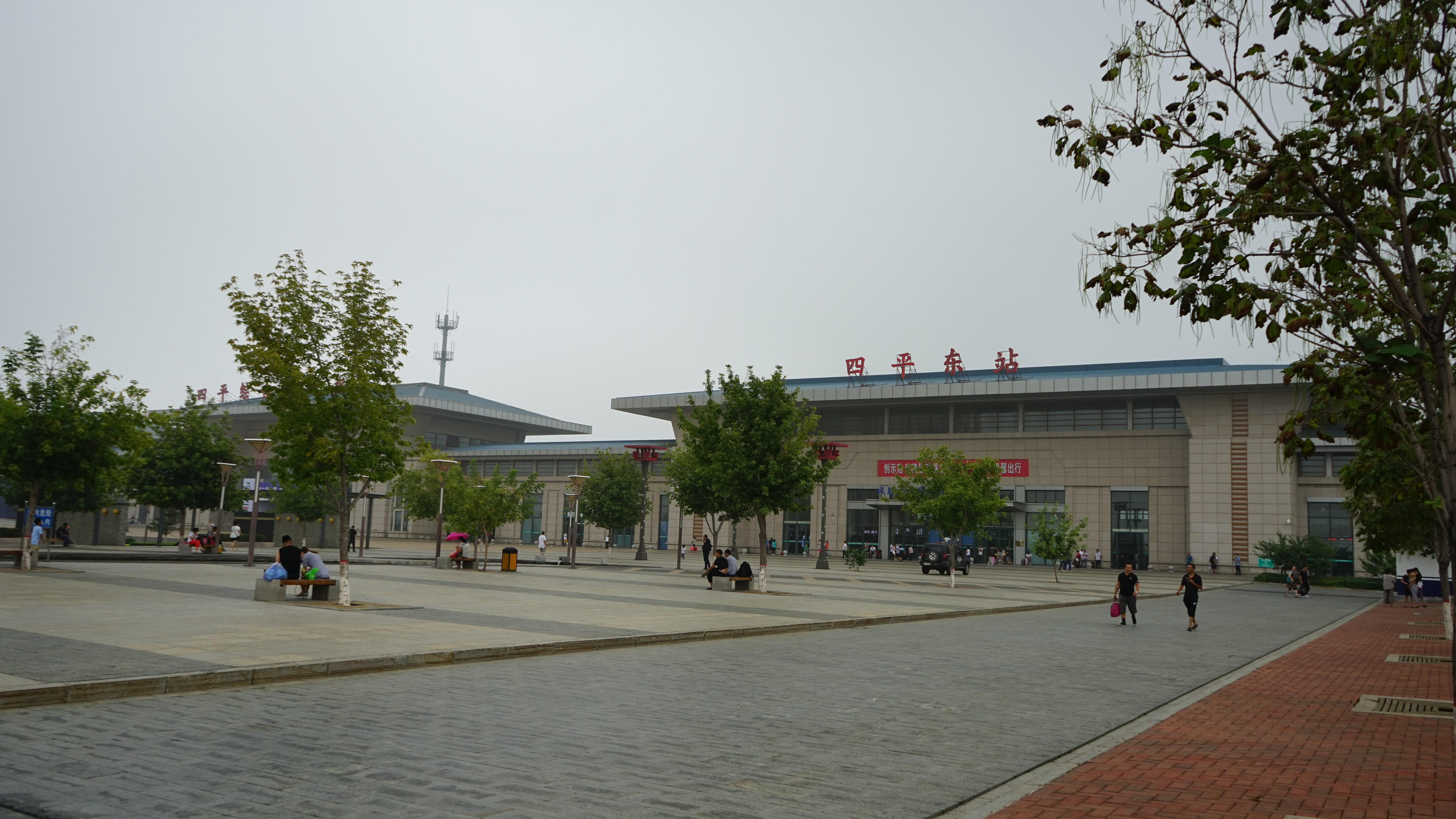 四平东站、综合客运枢纽